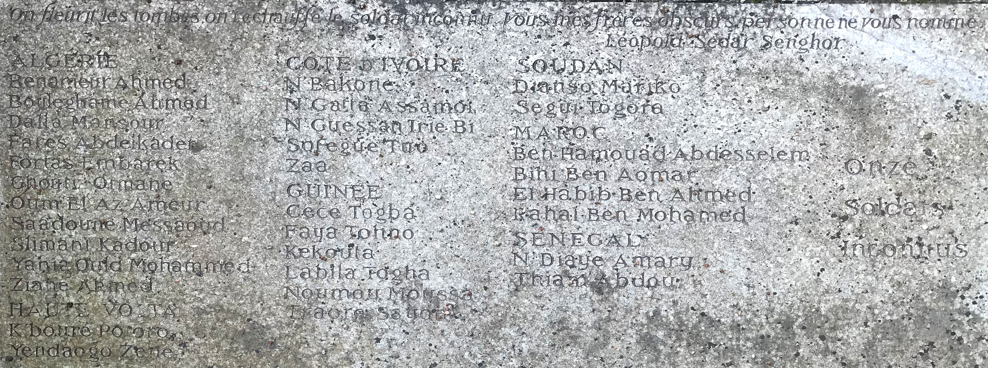 Monument aux 43 tirailleurs sénégalais par Robert Pouyaud : liste des victimes.